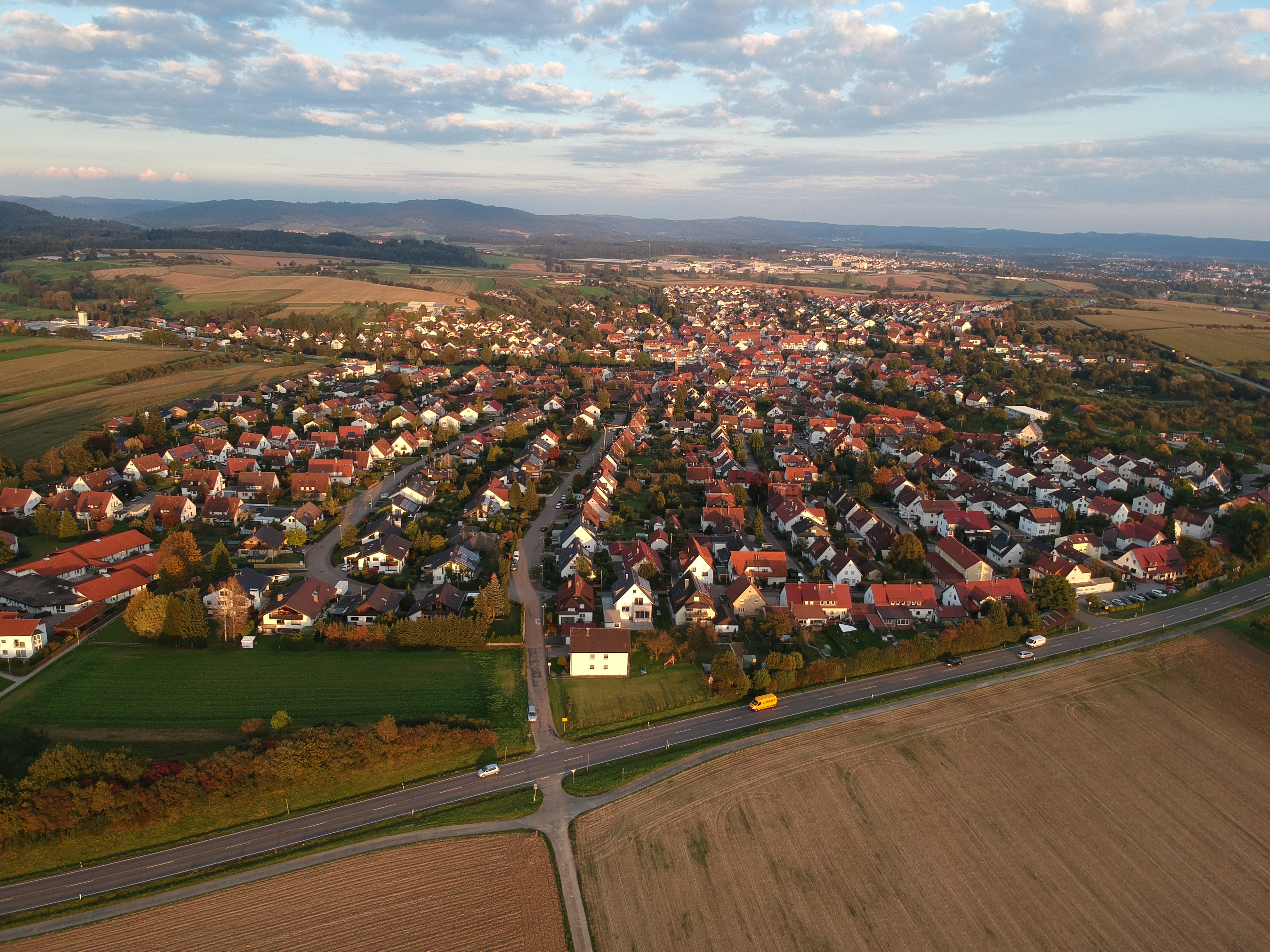 Blick aus westlicher Richtung über Großaspach